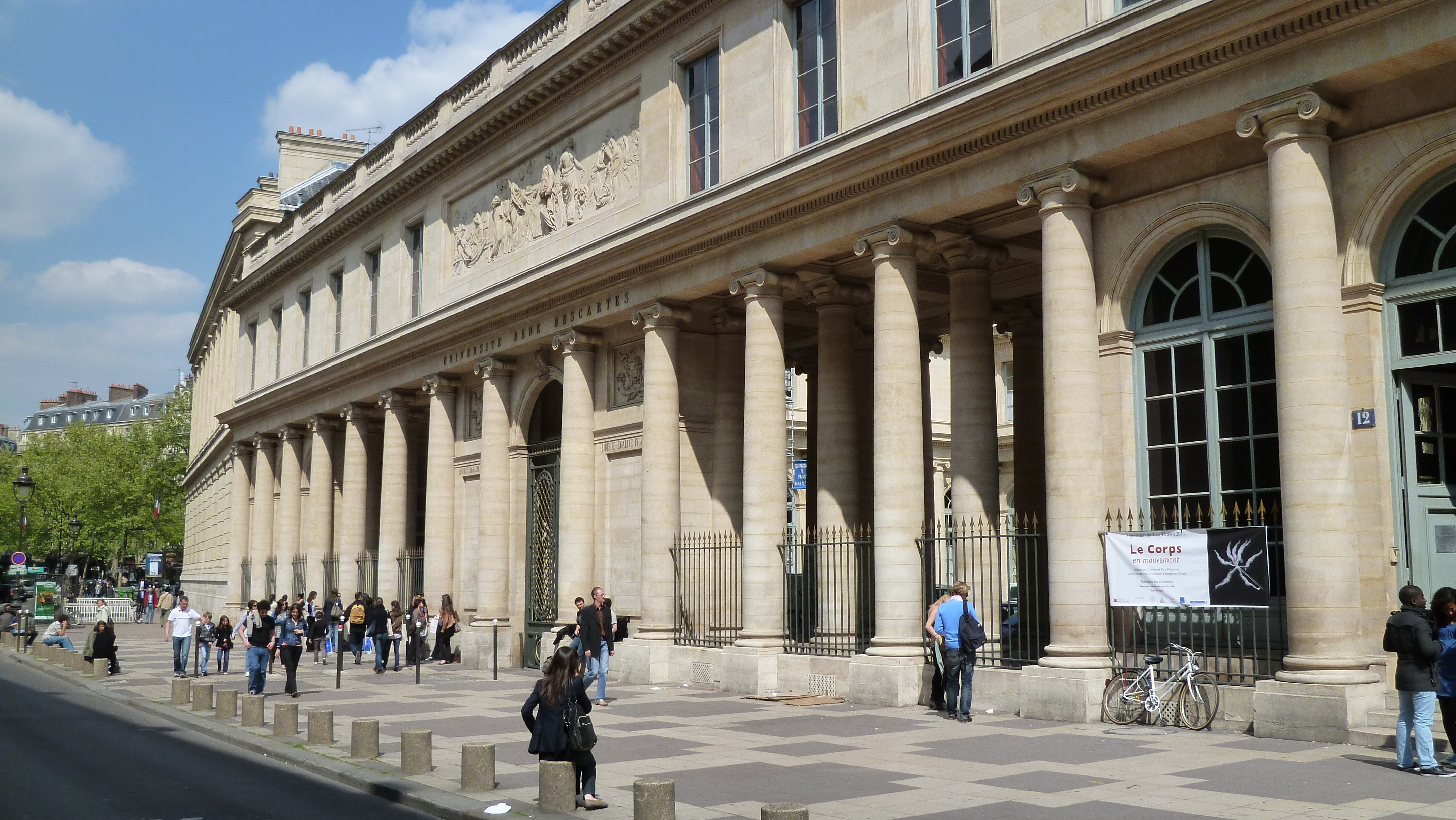 Universite de Medecine